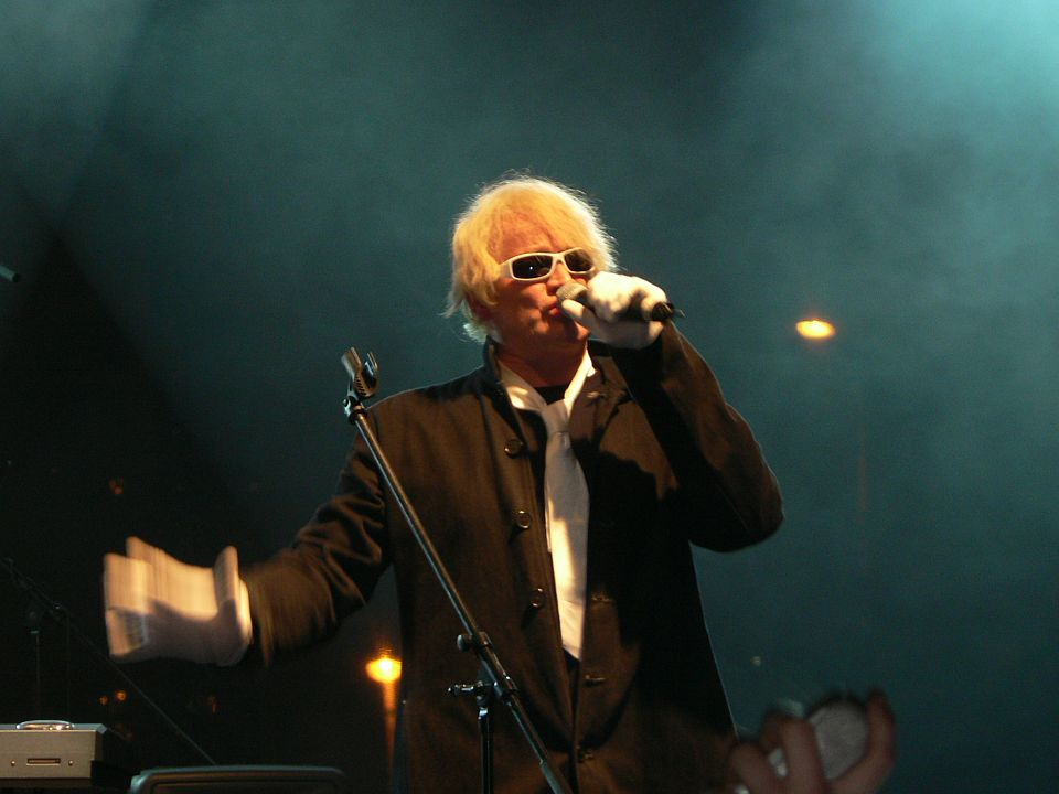 Michael Kocáb, Vinohradské vinobraní, Czech republic